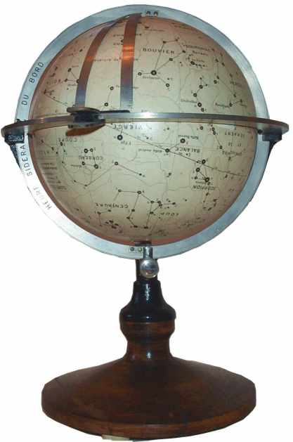 Deuxième photographie d'un navisphère, instrument destiné à la préparation d'une observation astronomique (une observation "astro" consiste à mesurer la hauteur angulaire d'un astre au-dessus de l'horizon)en vue de calculer un point astronomique (latitude, longitude). La durée pendant laquelle on peut observer à la fois l'horizon et les astres est très courte (4 à 5 minutes) lors de l'aube et du crépuscule. Aussi, il convient de savoir où les astres que l'on va observer se situent dans le ciel. Le navisphère sert à cela, on le cale à l'aide de la date d'observation et de données issues des "éphémérides nautiques" ou "connaissance des temps". J'ai fait la photographie et je suis le propriétaire du navisphère.